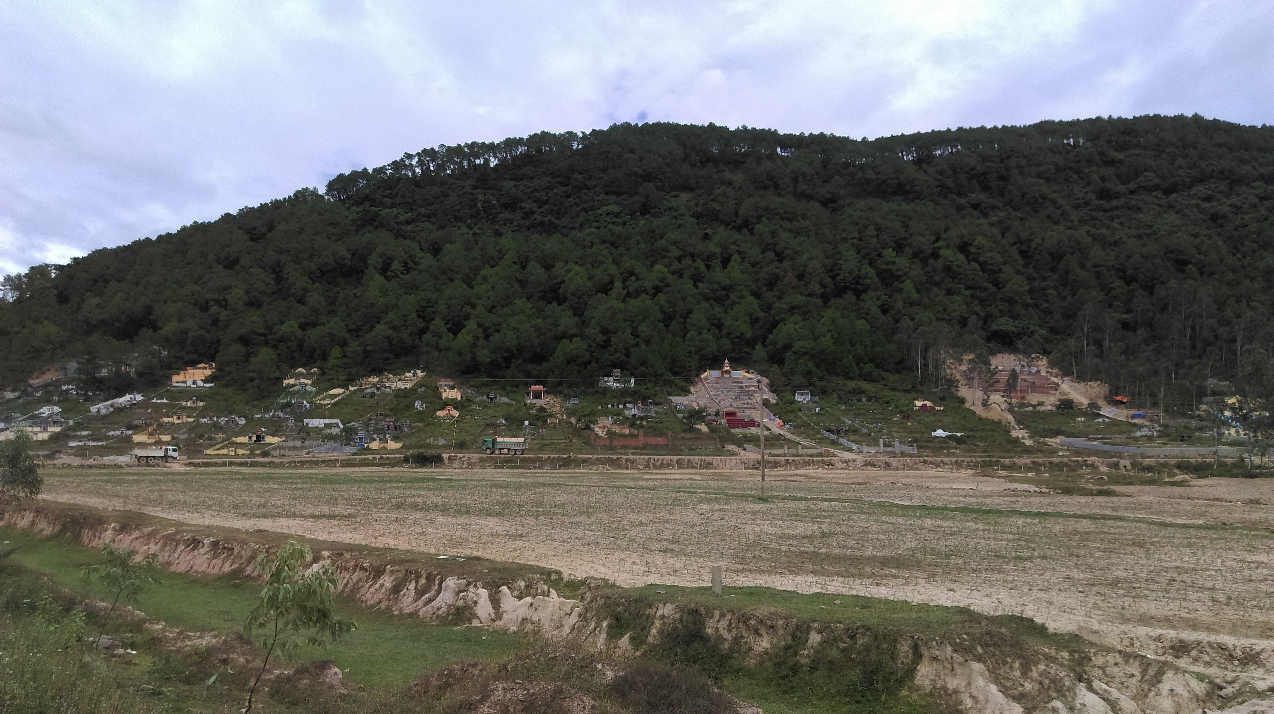 Núi phía tây xã Hưng Tây, Hưng Nguyên, Nghệ An